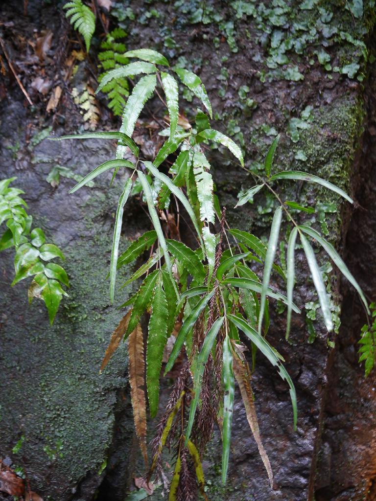 Pteris nipponica：マツザカシダ 2017/01/09 和歌山県田辺市：Tanabe City. Wakayama Pref. Japan